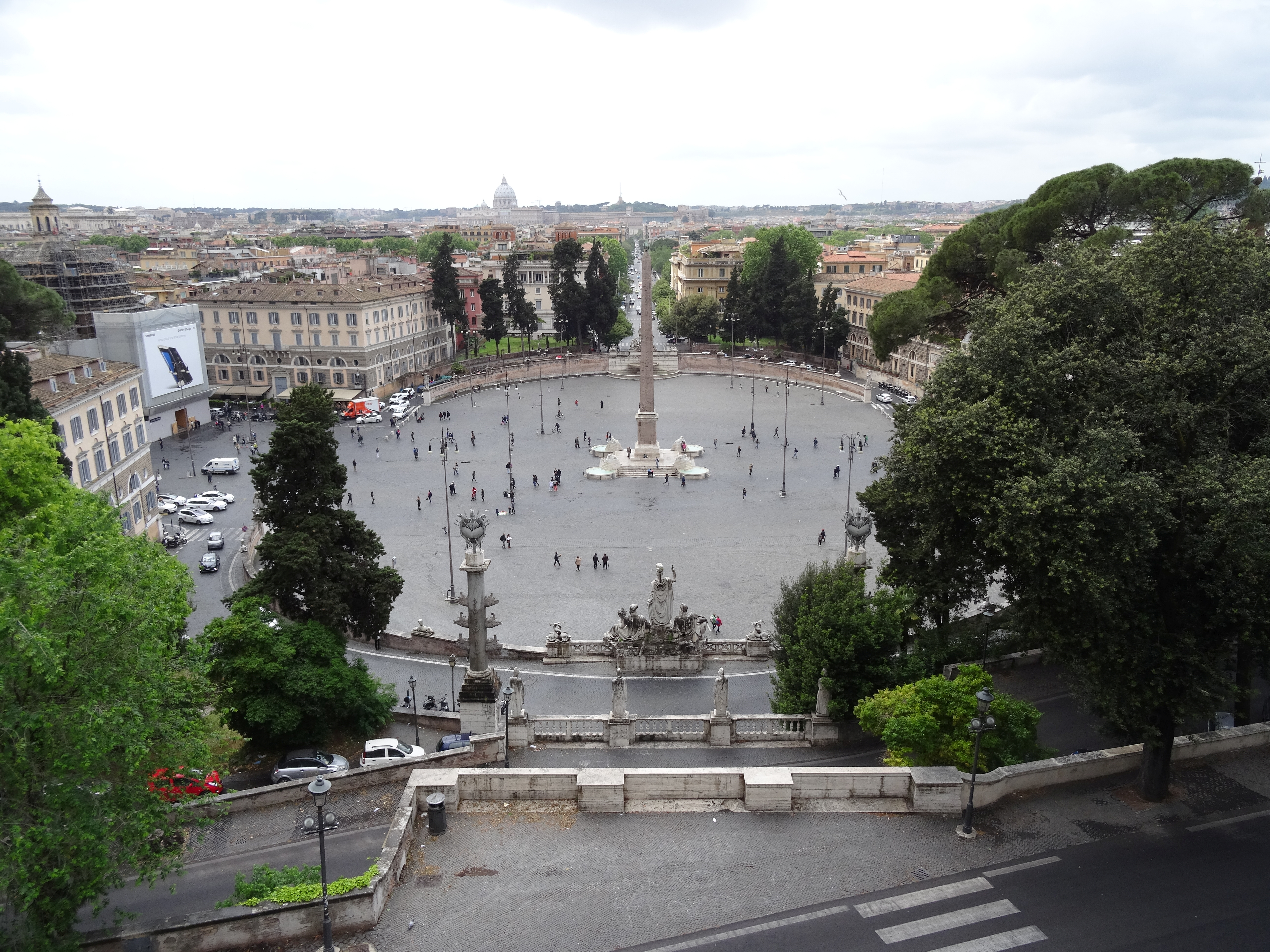 20160426 034 Roma - Piazza del Popolo